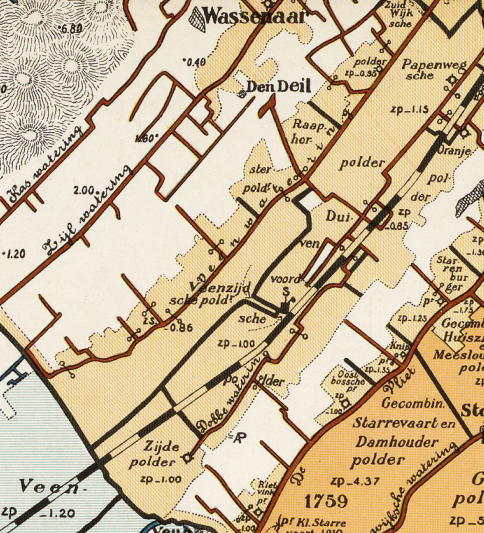 Polders in waterschap Duivenvoordse-Veenzijdse_Polder